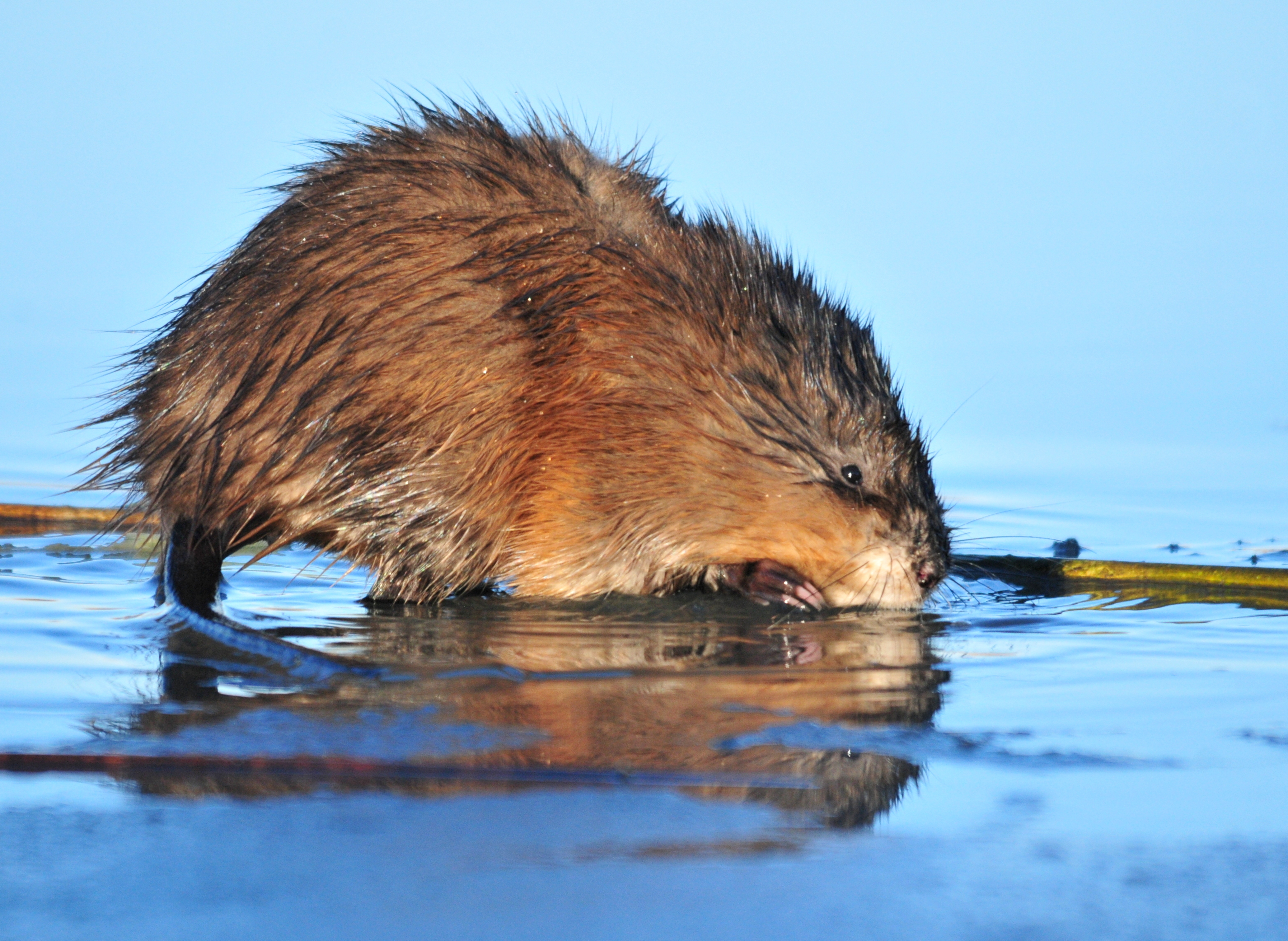 Photo: Tom Koerner/USFWS